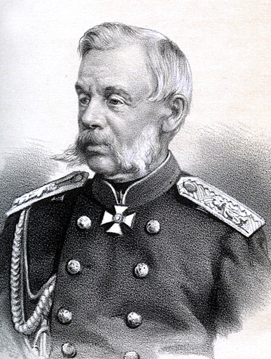 Dmitry Alekseyevich Milyutin (Дмитрий Алексеевич Милютин), Russian Marshal, (b.1816-d.1912)